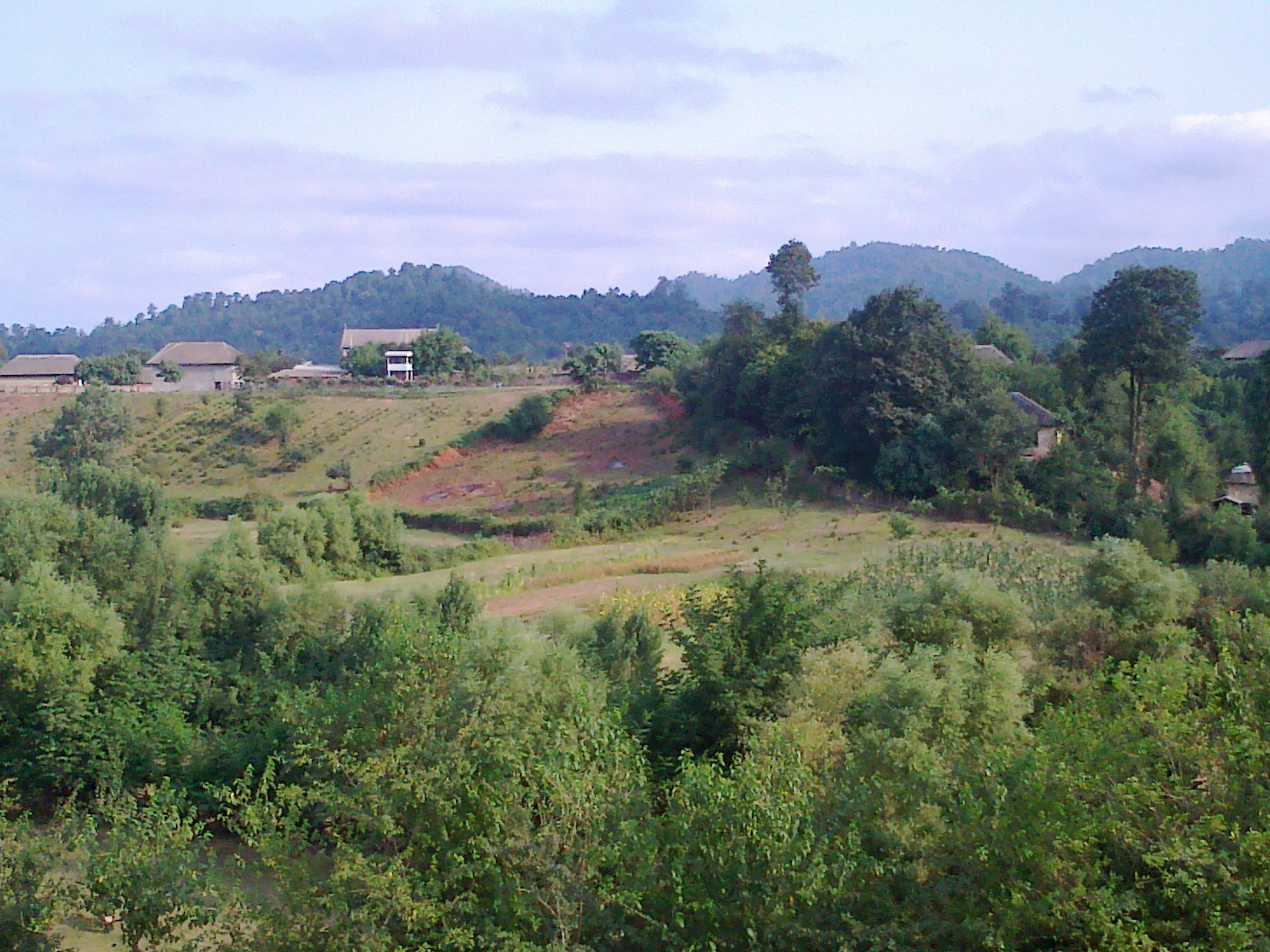 Вид на дома и горы. Село Хавзава